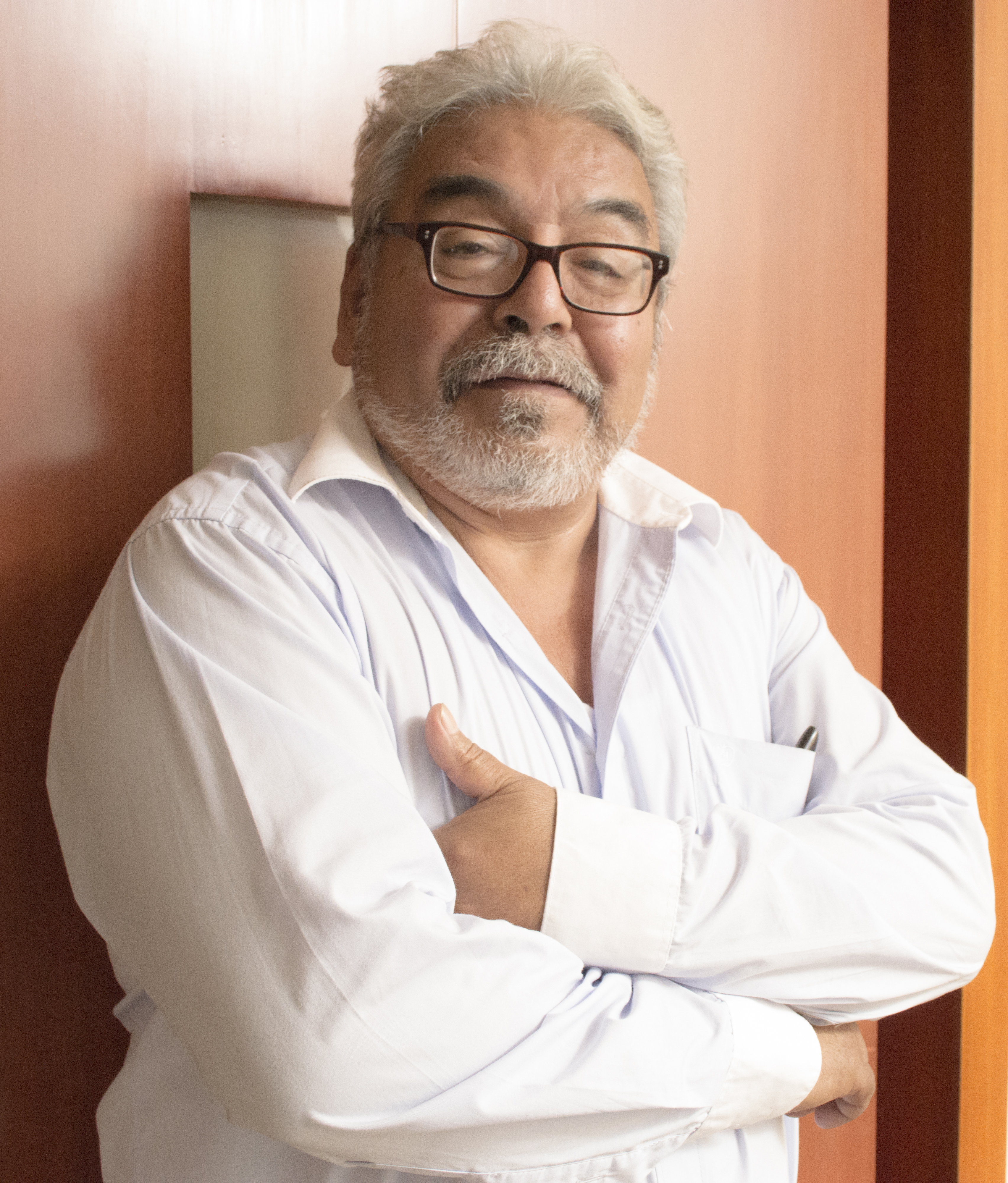 Henry Layana durante el rodaje de una película en Guayaquil, Ecuador, el 14 de enero de 2015.